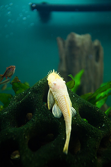 Albino bristlenose pleco